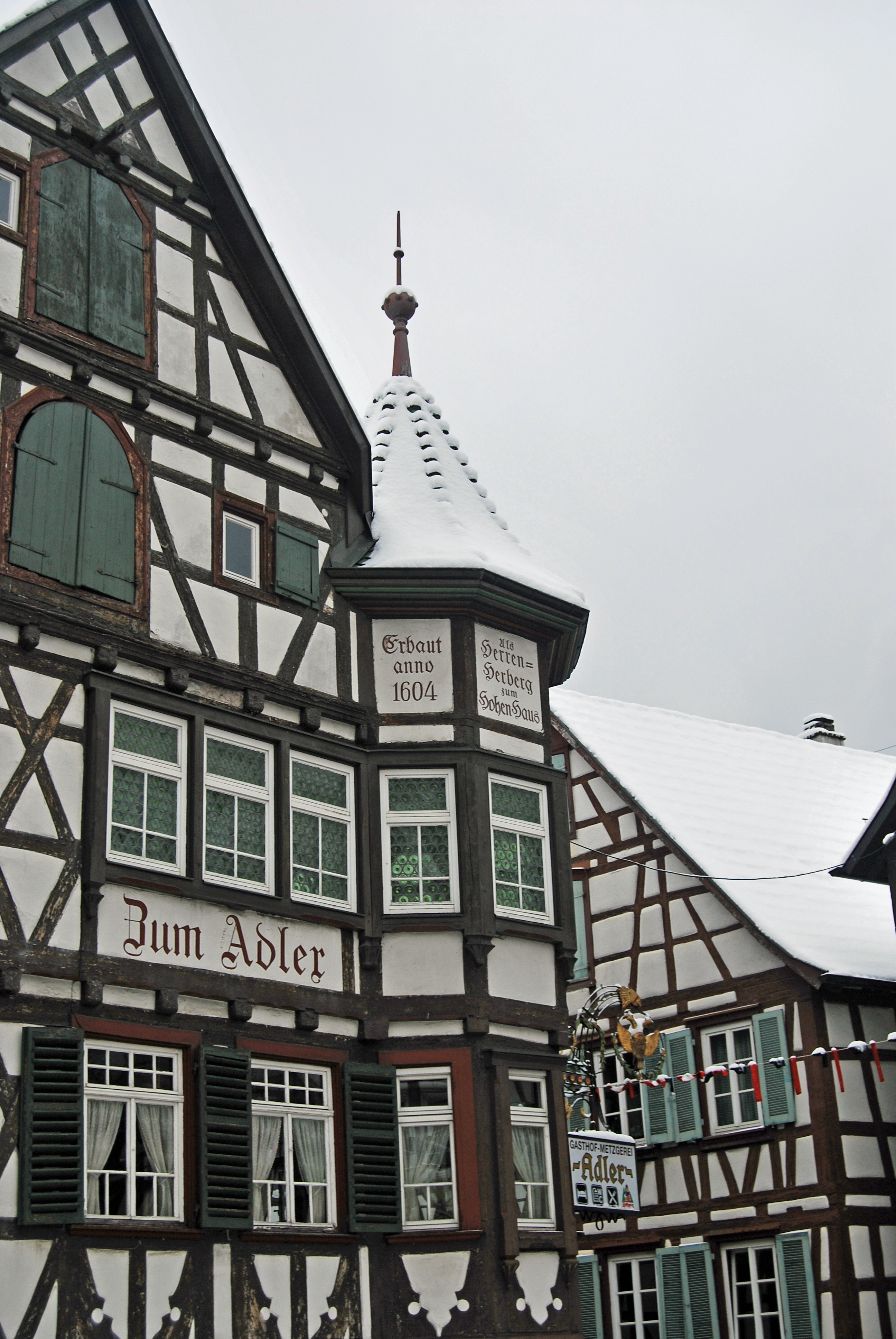 Altstadt von Schiltach im Winter